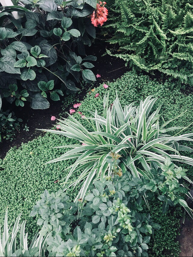 Экспозиция в Забайкальском ботаническом саду